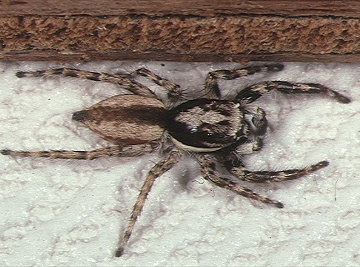 male Menemerus bivittatus from Okinawa.